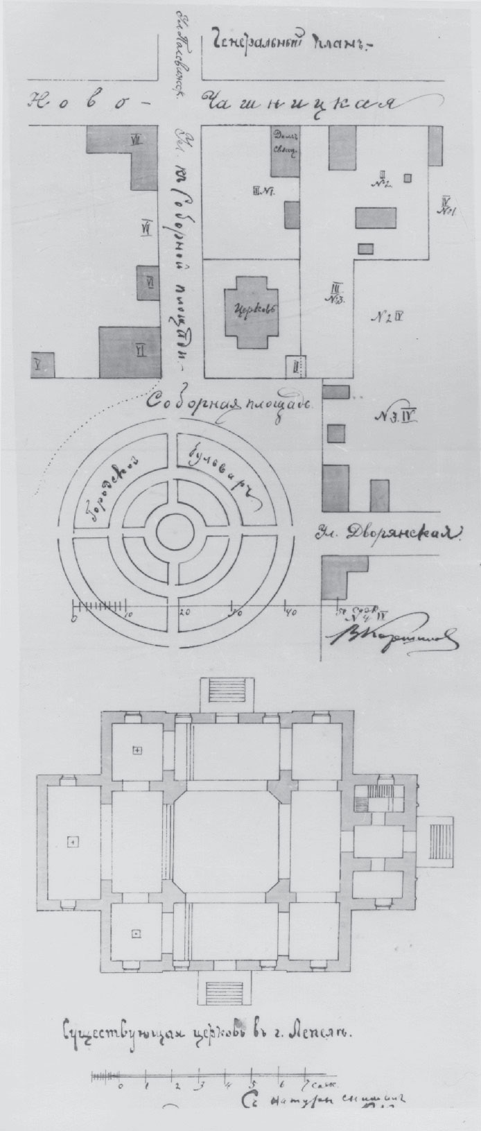 Беларуская (тарашкевіца): Лепель (Lepiel), вуліцы Чашніцкая (vulica Čašnickaja), Поўсьвіская (vulica Poŭśviskaja), Шляхецкая (vulica Šlachieckaja) і пляц Рынак (plac Rynak). Сытуацыйны плян будаваньня царквы.